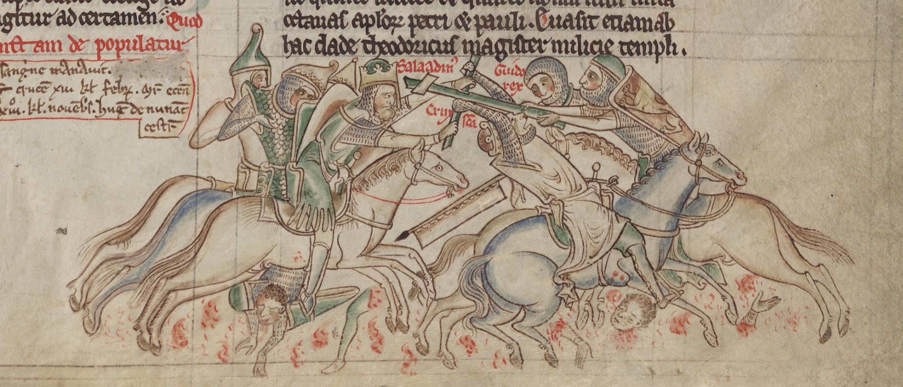 Saladin a spol